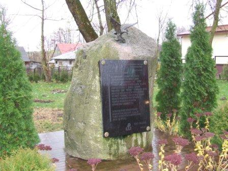 Kamień granitowy upamiętniający podziemną działalnośc mieszkańców Ceranowa. Znajduje się przed budynkiem Urzędu Gminy Ceranów.